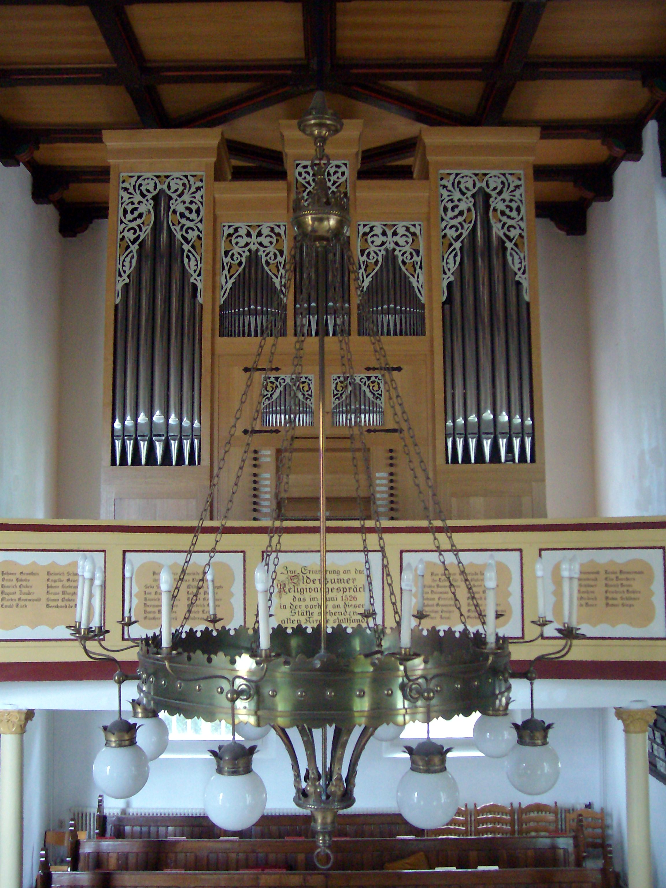 Orgel der Reformierten Kirche in Oldersum